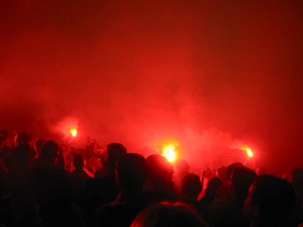 Race na stadionie Widzewa Łódź